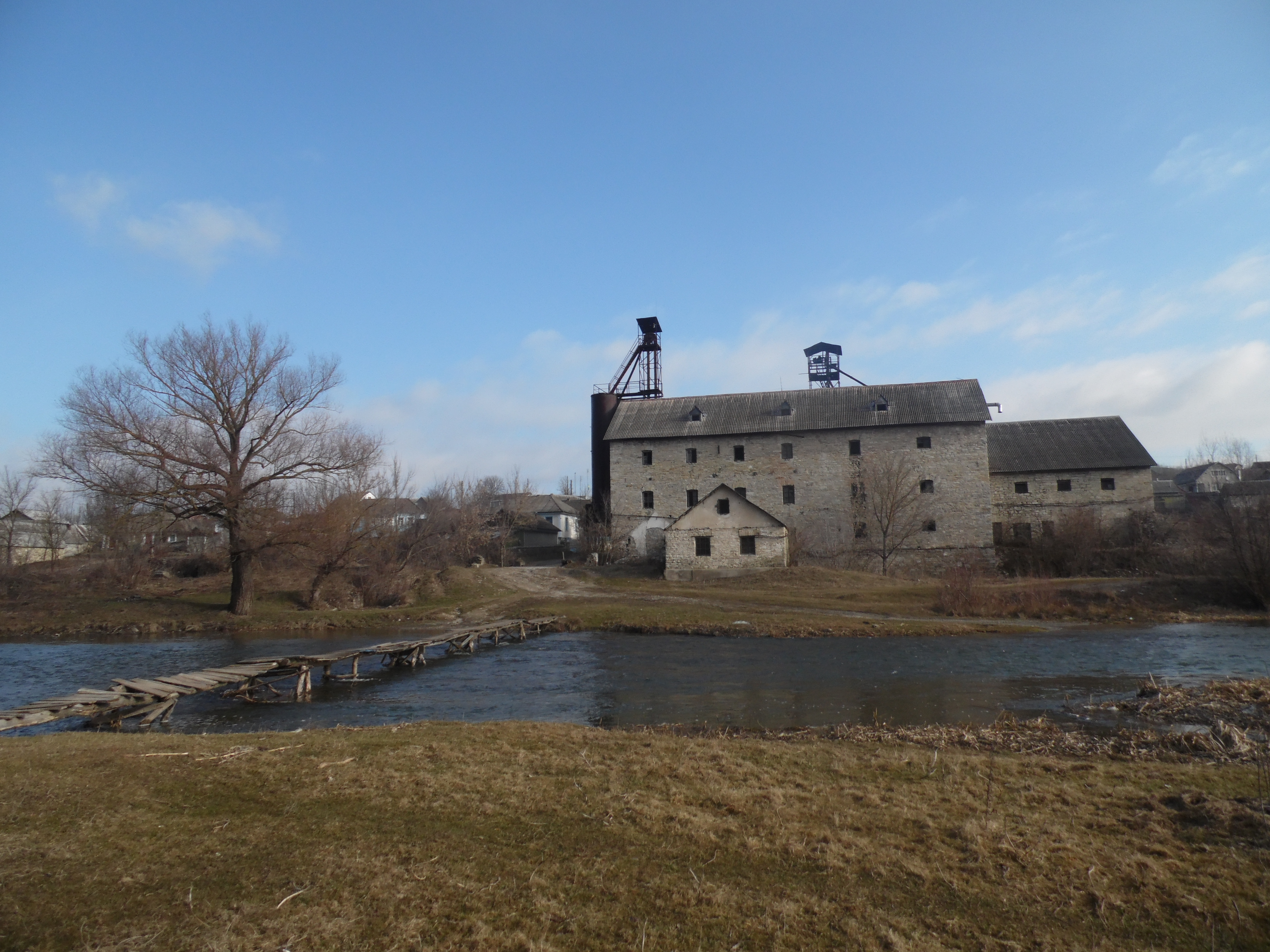 Залишки млина у селі Голосків Хмельницької області України. Радянський період.